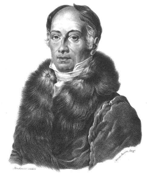 Tadeusz Mostwoski